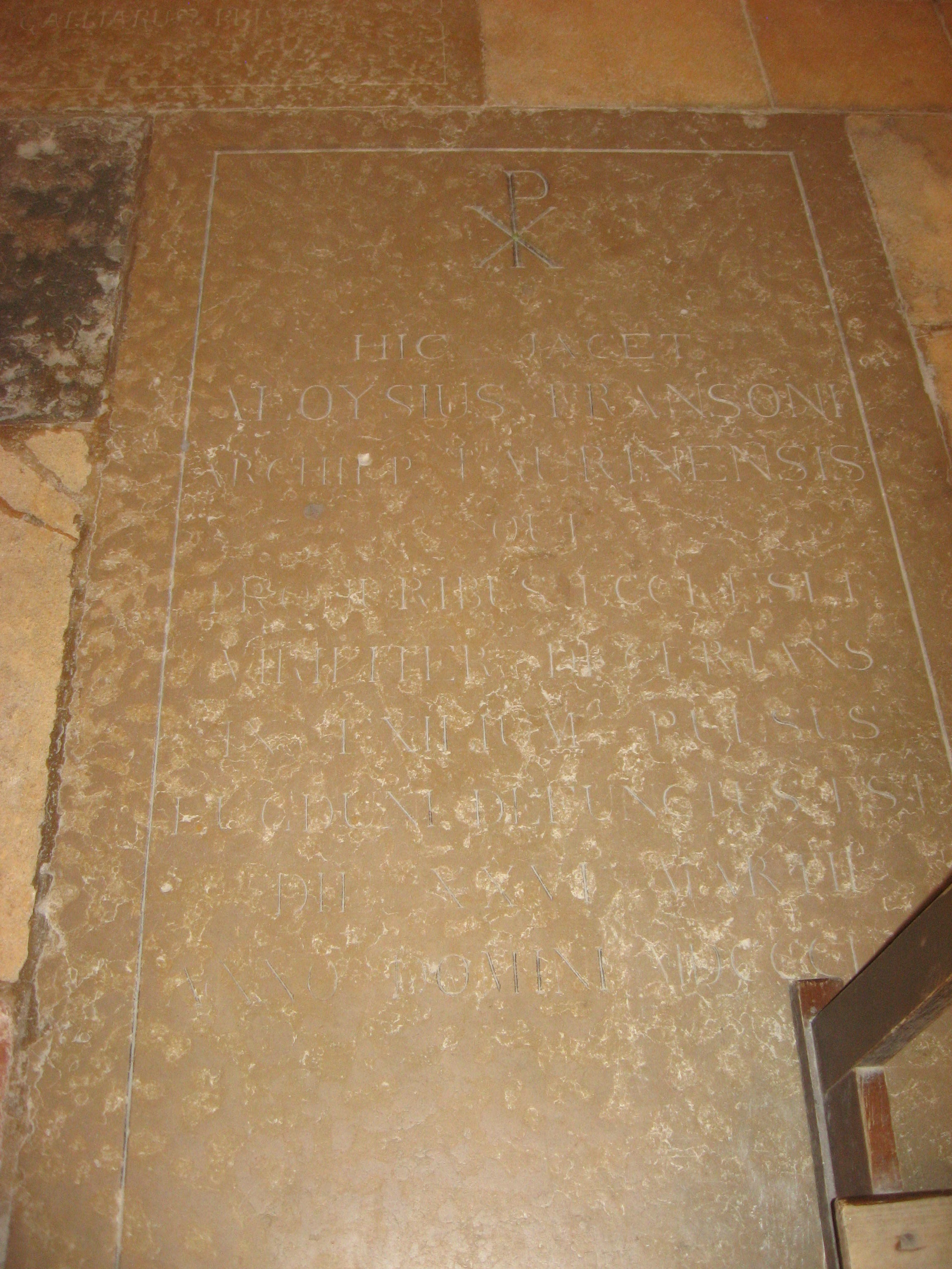 je ne suis pas vraiment l'auteur de "cette oeuvre" ;) par contre je l'ai prise en photo